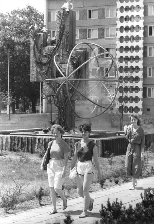 Cottbus, "Brunnen des Friedens", Studentenwohnheim ADN-ZB Settnik 15.10.86 Cottbus: Der "Brunnen des Friedens" schafft eine angenehme Atmosphäre vor einem Studentenwohnheim der Ingenieurhochschule Cottbus. Diese Kollektivarbeit von Studenten und Mittarbeitern entstand 1984 unter der Leitung von Walter Heinrich, Maler und Grafiker und seit 1976 an der Ingenieurhochschule verantwortlich für die volkskünstlerichen arbeiten der Studenten auf den Gebieten der Malerei, Grafik, Keramik und der angewandten Kunst.